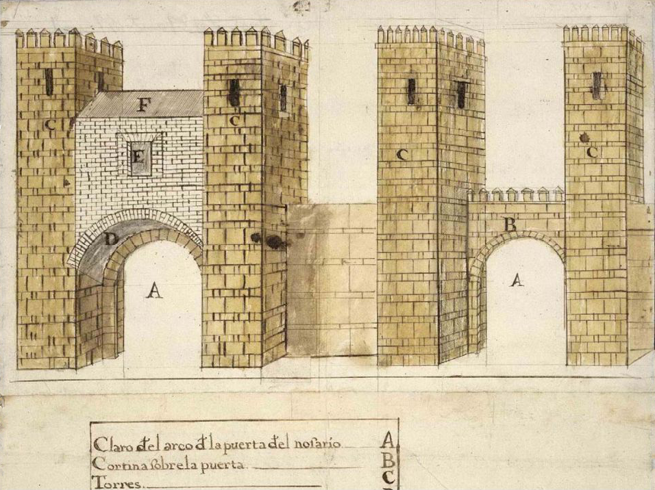 Perspectiva de la puerta de Osario de la ciudad de Córdoba (España) con el proyecto de una habitación entre las torres para la mayor comodidad de los ermitaños del desierto de Nuestra Señora de Belén, que tienen allí su hospedería. 1730. Archivo General de Simancas.